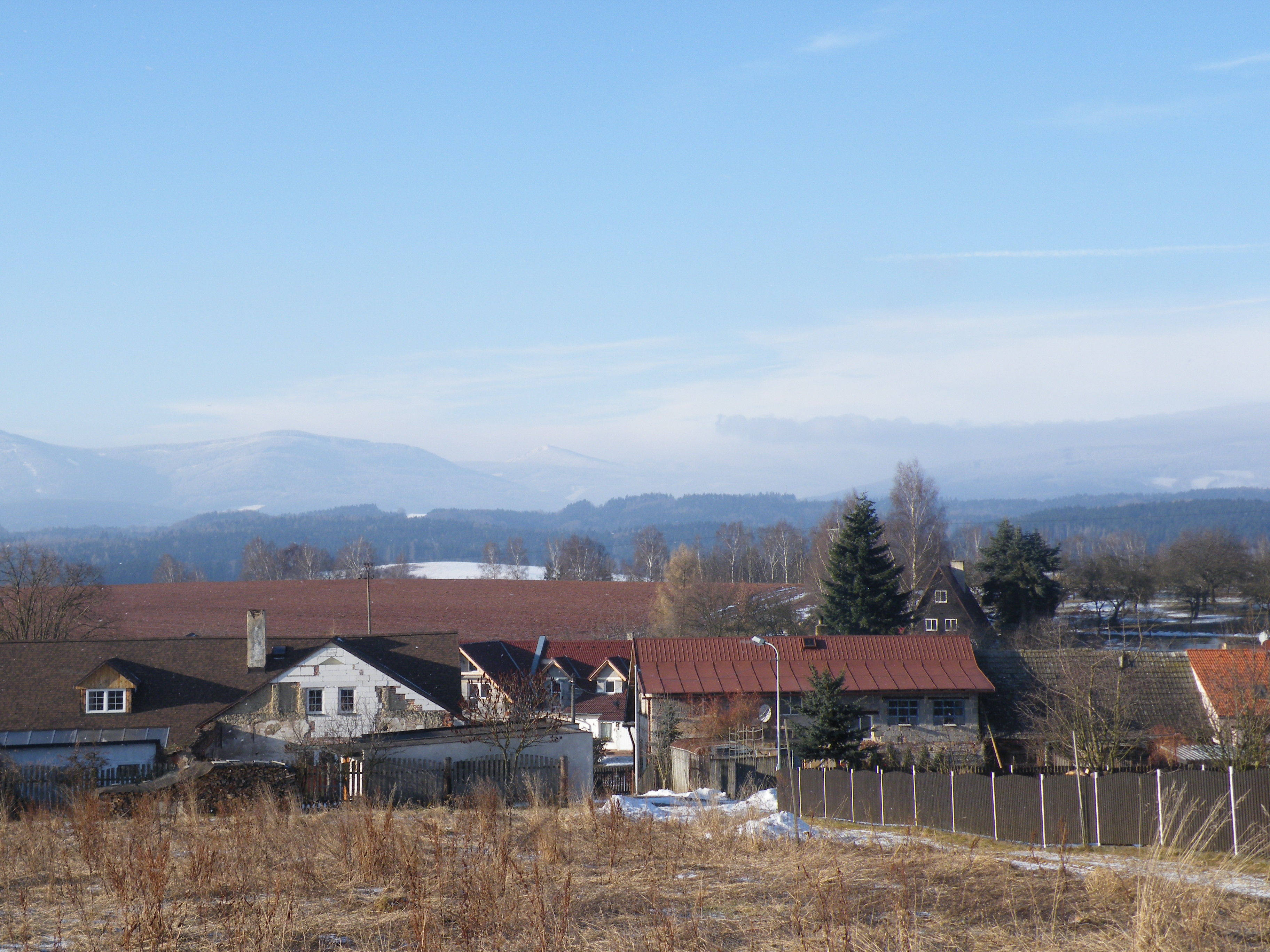 ObӀanov nová zástavba